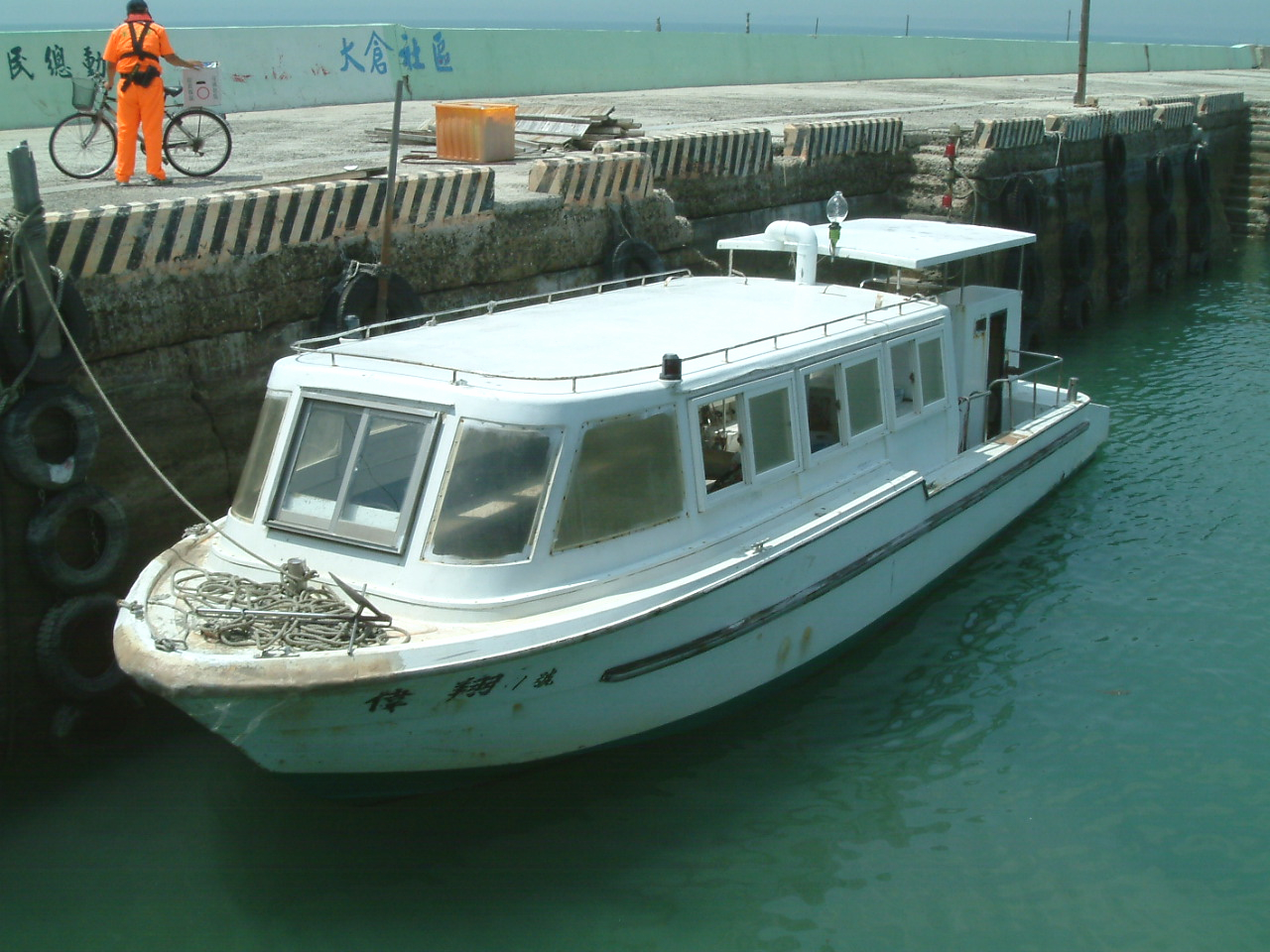 往澎湖縣大倉嶼的交通船偉翔一號。